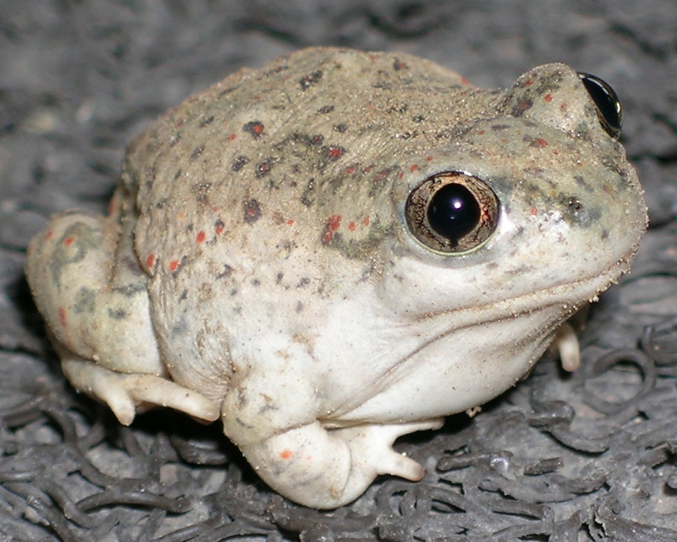 Spea multiplicata, at El Morro National Monument, New Mexico, USA